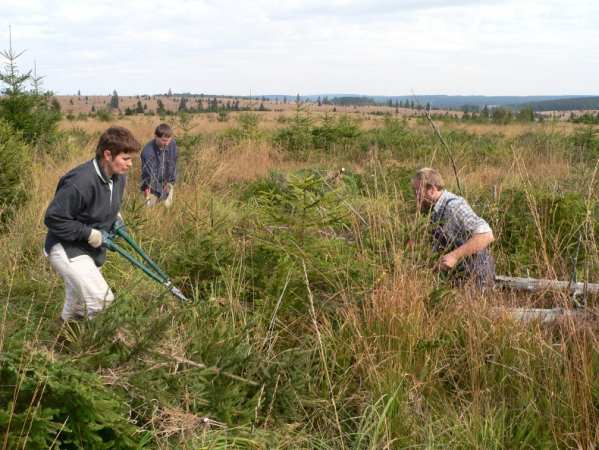 Travaux de sauvegarde des « Amis de la Fagne » sur le site de l'ancien bois Calozet. Roger Herman pour « Les Amis de la Fagne ».